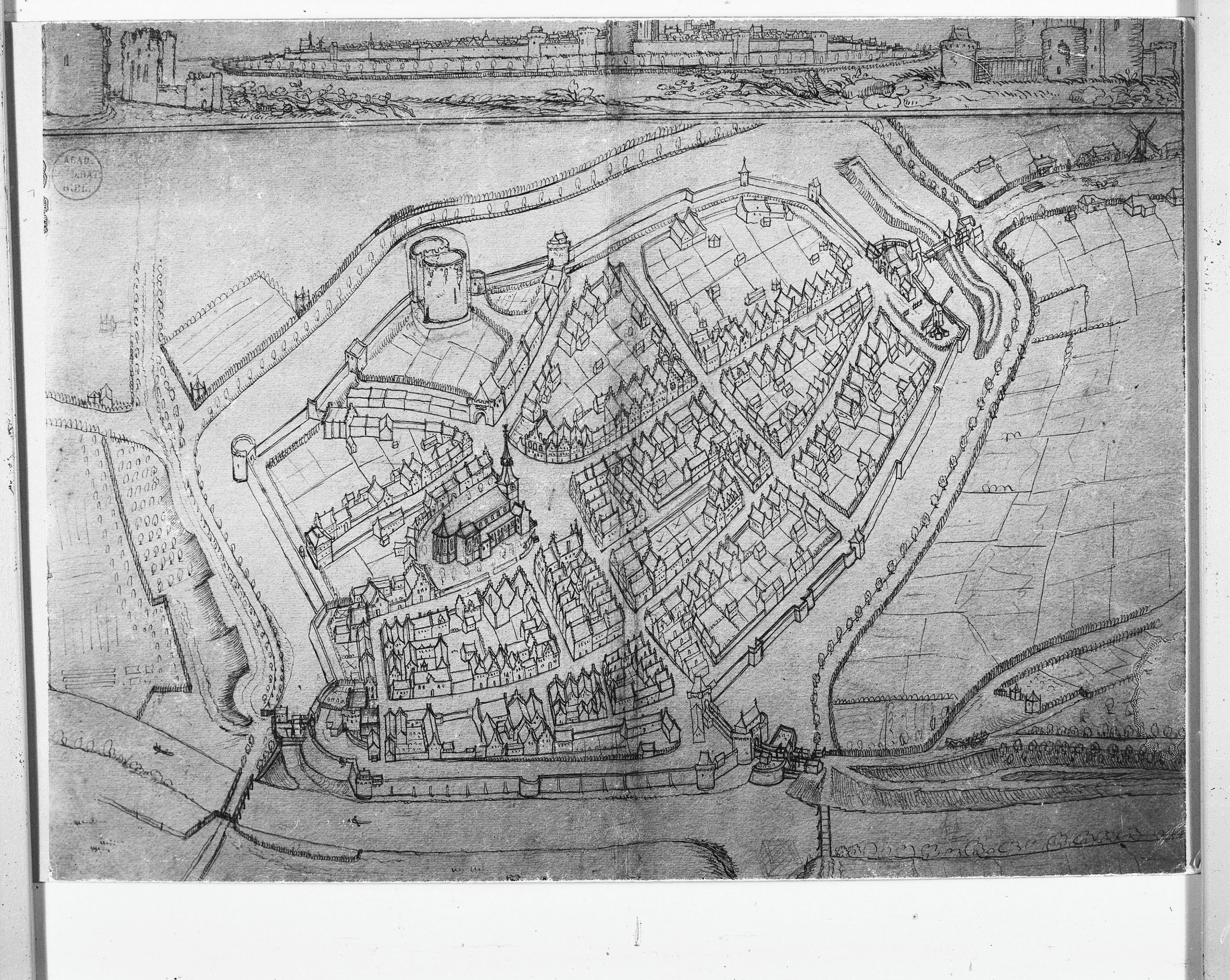 Plattegronden en overzichten: plattegrond en profiel der stad, naar tekening in de verzameling Bodel Nijenhuis Universiteits Bibliotheek Leiden. reproductie van foto